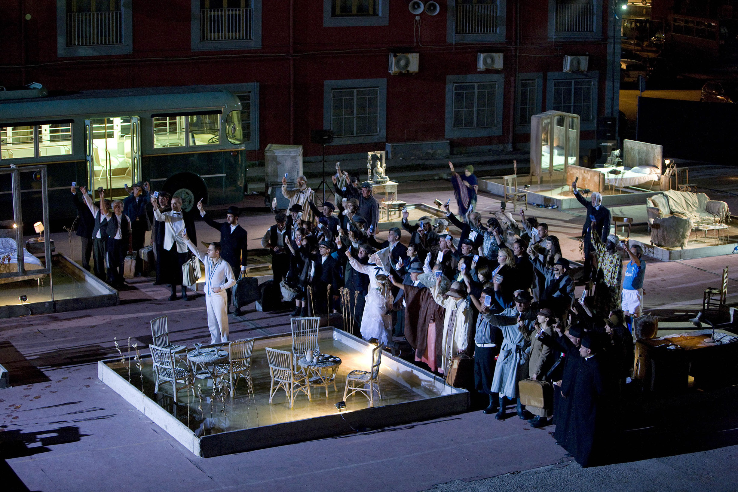 Proprio come se nulla fosse avvenuto. Natura morta per la Darsena Acton di Napoli di Roberto Andò Darsena Acton Napoli Teatro Festival Italia, giugno 2008